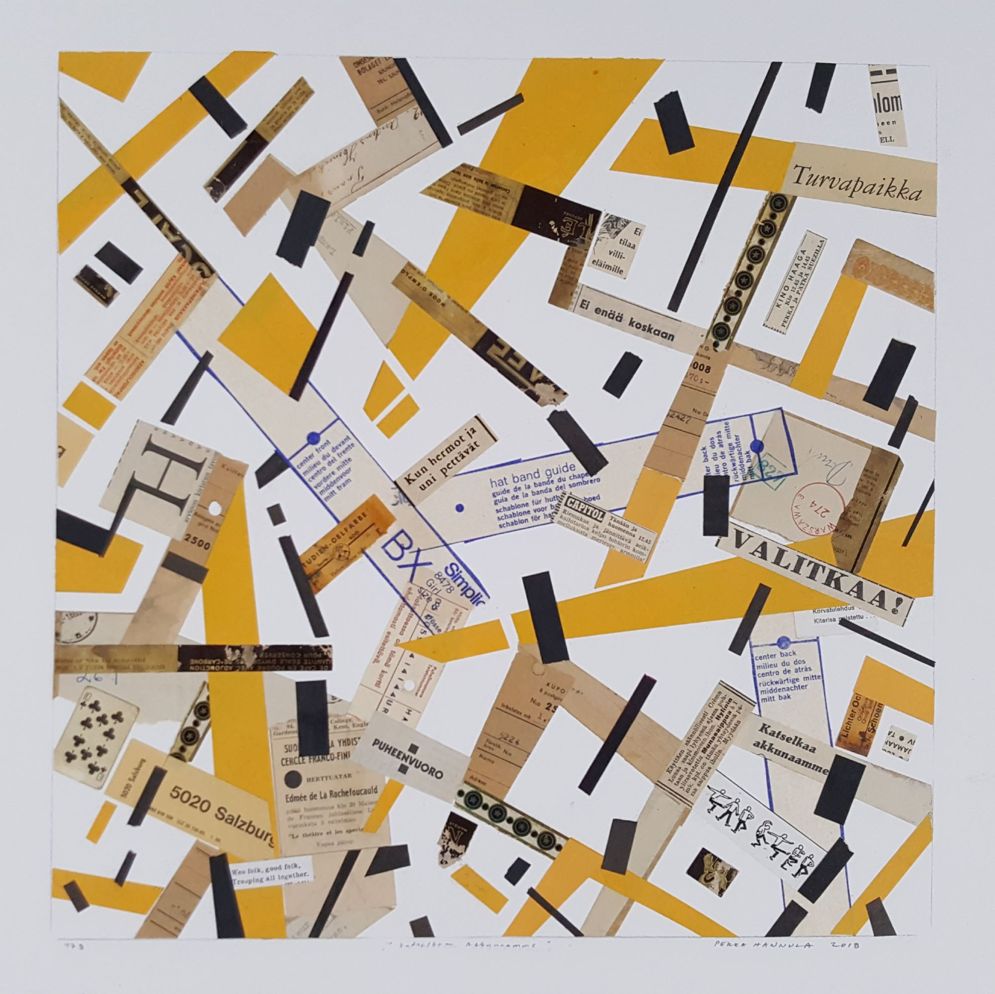 Pekka Hannula, Katselkaa akkunaamme, kollaasi, 2018, 40x40cm